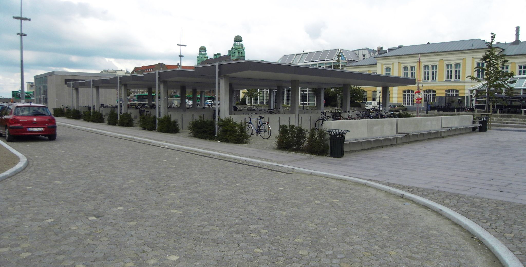 En vy över cykelgaraget på Bagers plats i Malmö.